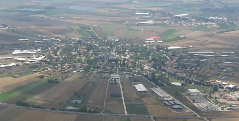 Nahalal viewed from the air. Original description was: מושב נהלל. צילום אוויר לכיוון מערב. צילמתי והעלתי ב8 במאי 2006. אסף.צ 19:38, 8 מאי 2006 (IDT)